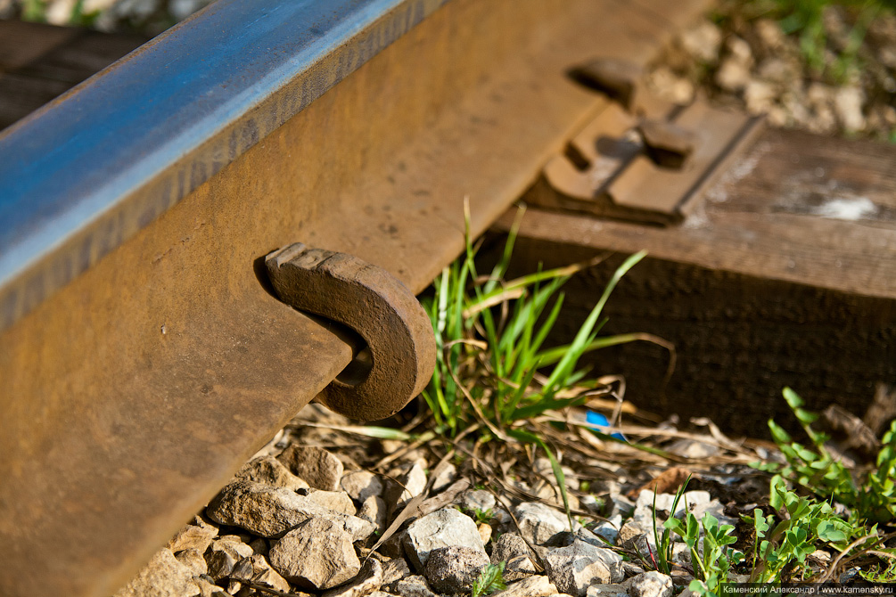 Противоугон — устройство для защемления подошвы рельса и передачи продольных сил при движении подвижного состава на шпалы или подкладки; препятствует продольному перемещению рельсов — угону пути.